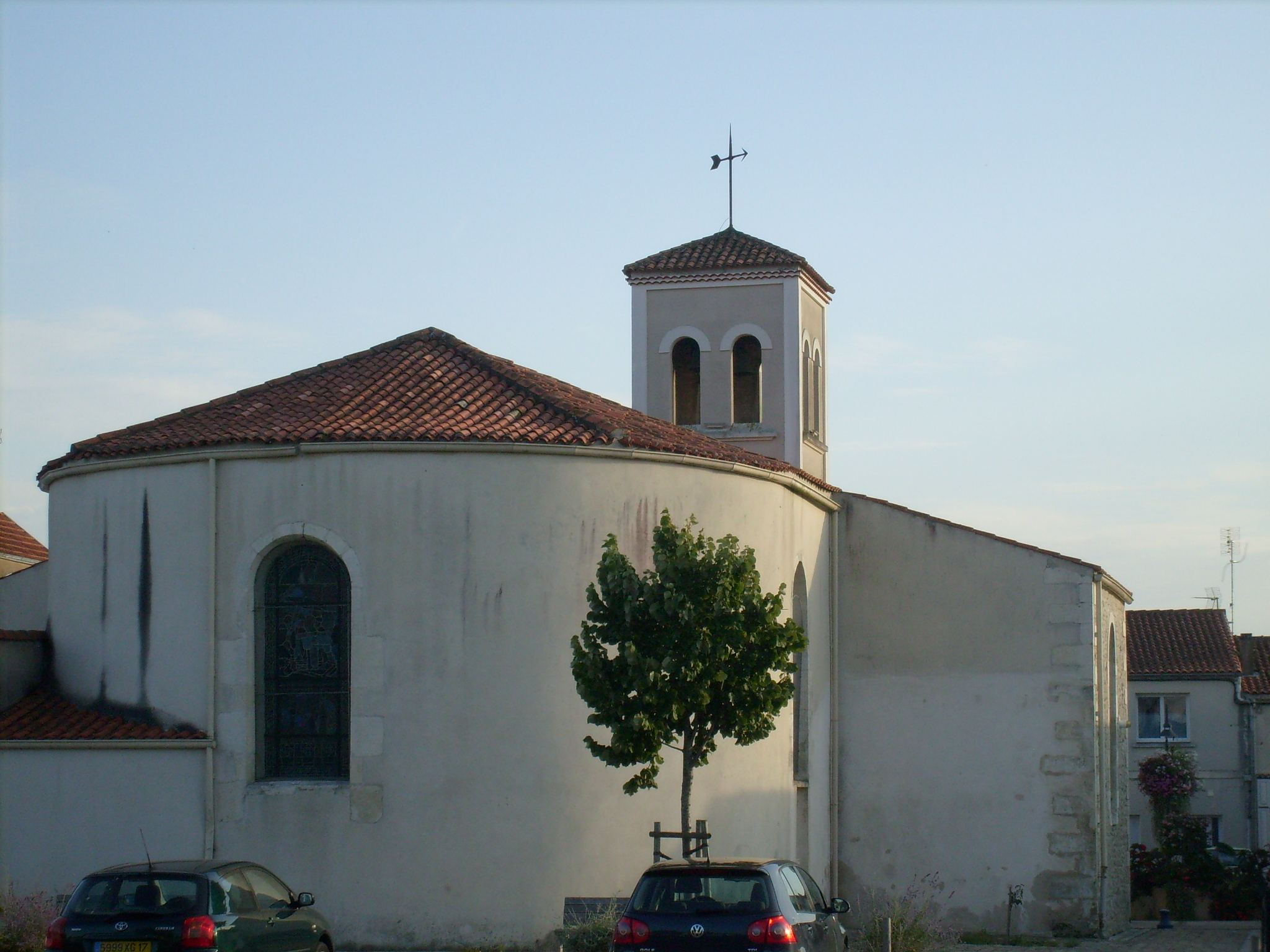 Eglise Saint-Louis de Bourcefranc